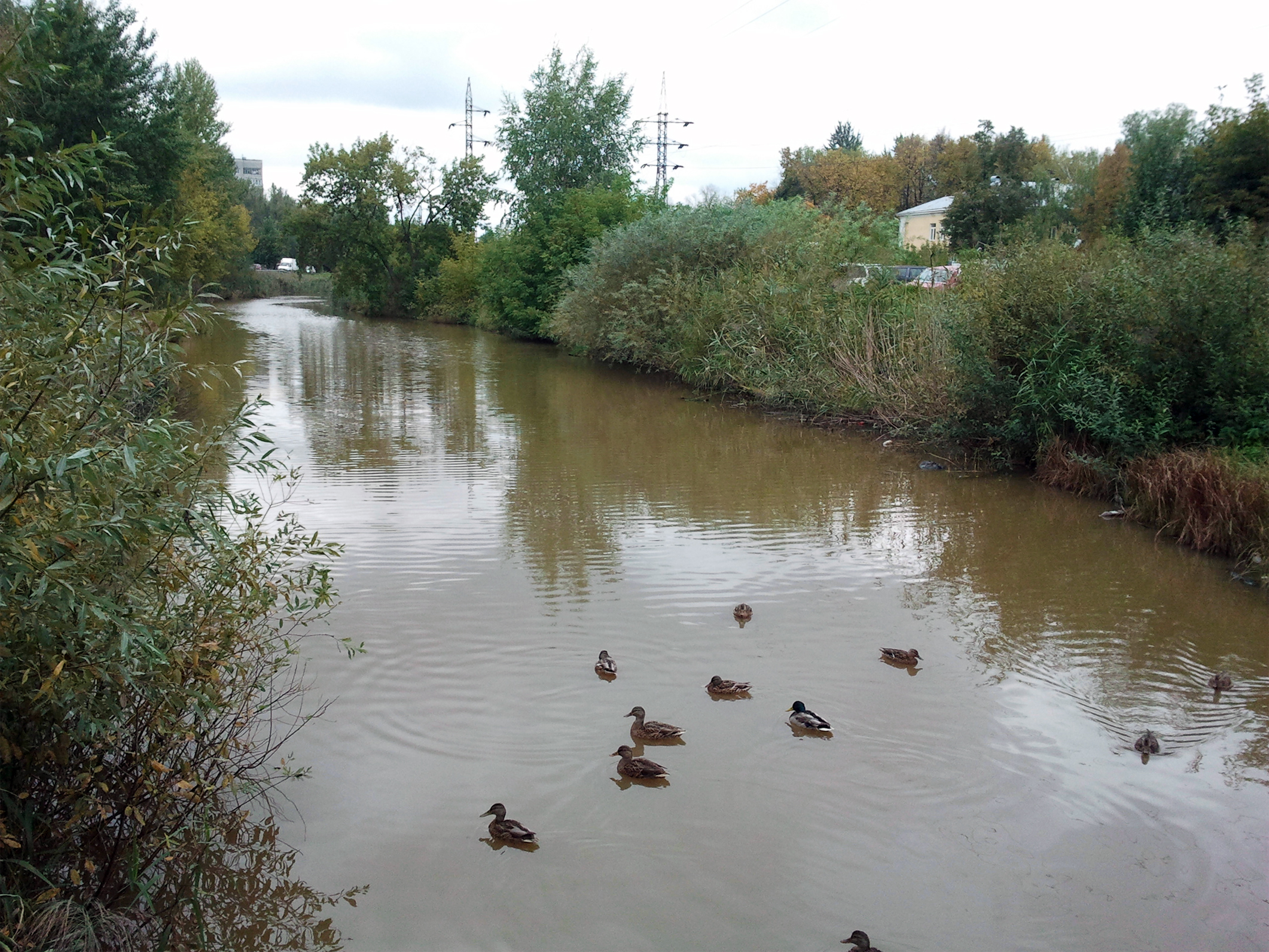 Нижний Новгород. Река Левинка в Московском районе